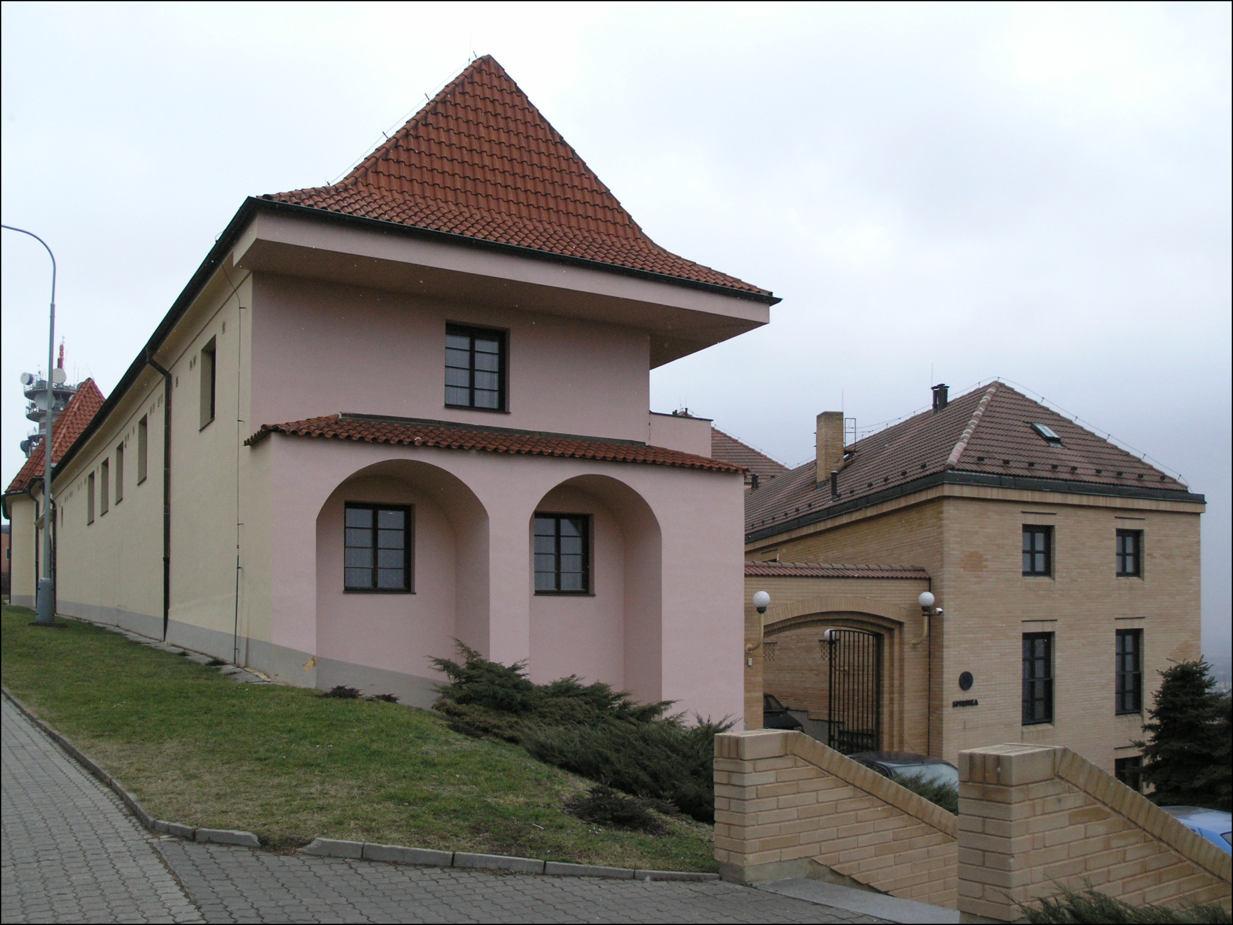 Praha, Břevnov - bývalá usedlost Spiritka, dnes hotel